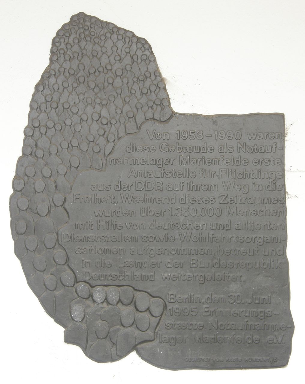 Gedenktafel am Notaufnahmelager Marienfelde, Marienfelder Allee, Berlin-Marienfelde